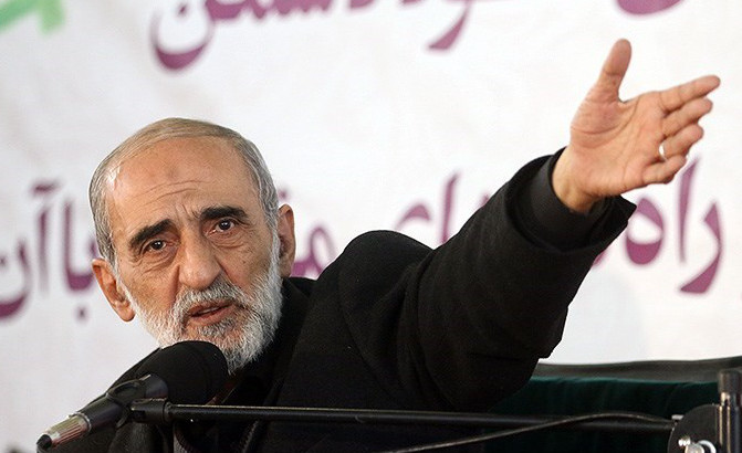 حسن شریعت‌مداری در بیست و یکمین همایش دفتر پژوهش‌های فرهنگی موسسه آموزشی و پژوهشی امام خمینی با عنوان «بررسی شیوه‌های نفوذ دشمن در انقلاب اسلامی و راهکارهای مقابله با آن» صبح یکم بهمن ۱۳۹۴در مسجد جمکران